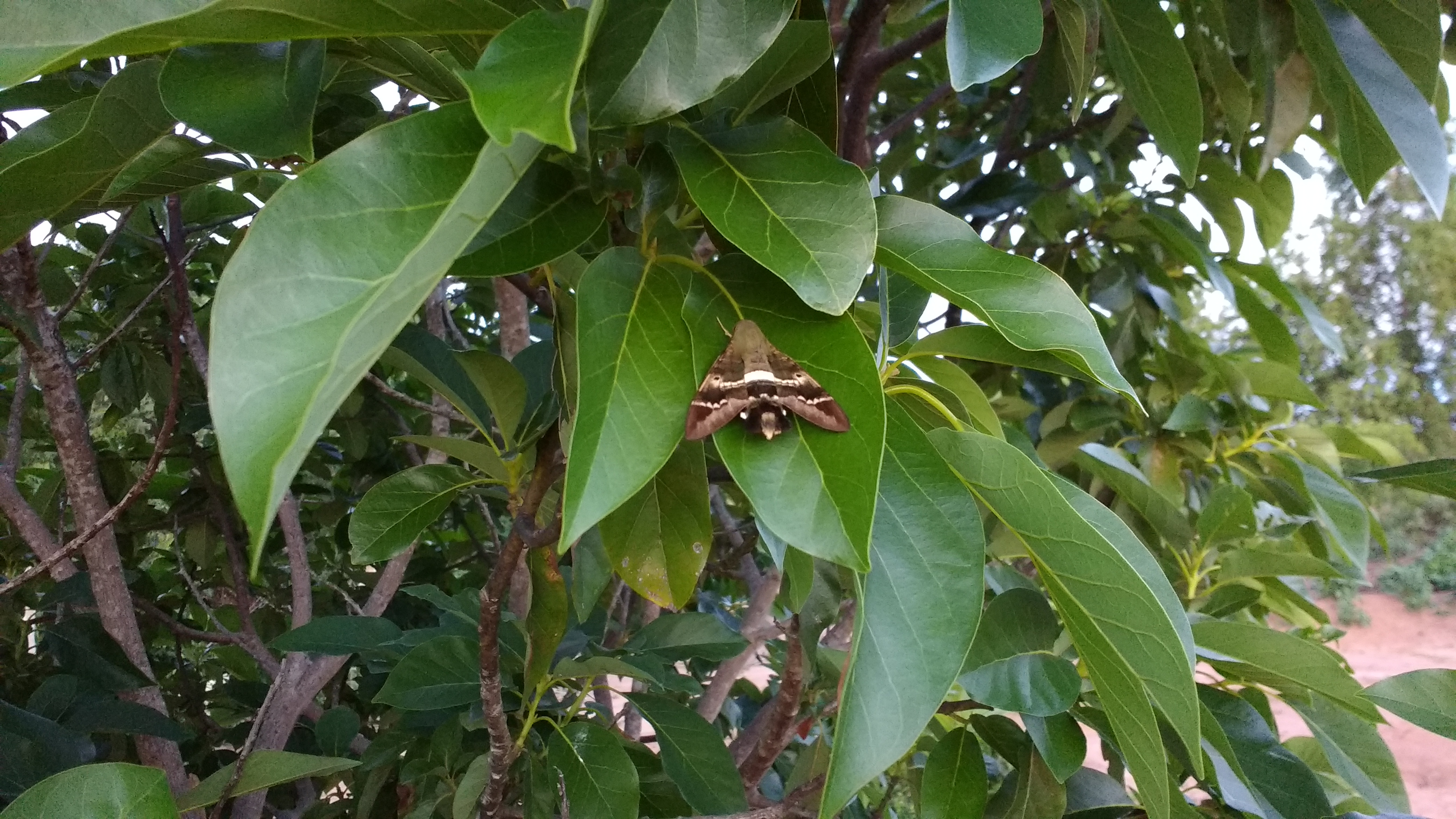 Mariposa Aellopos fadus descansa numa árvore.